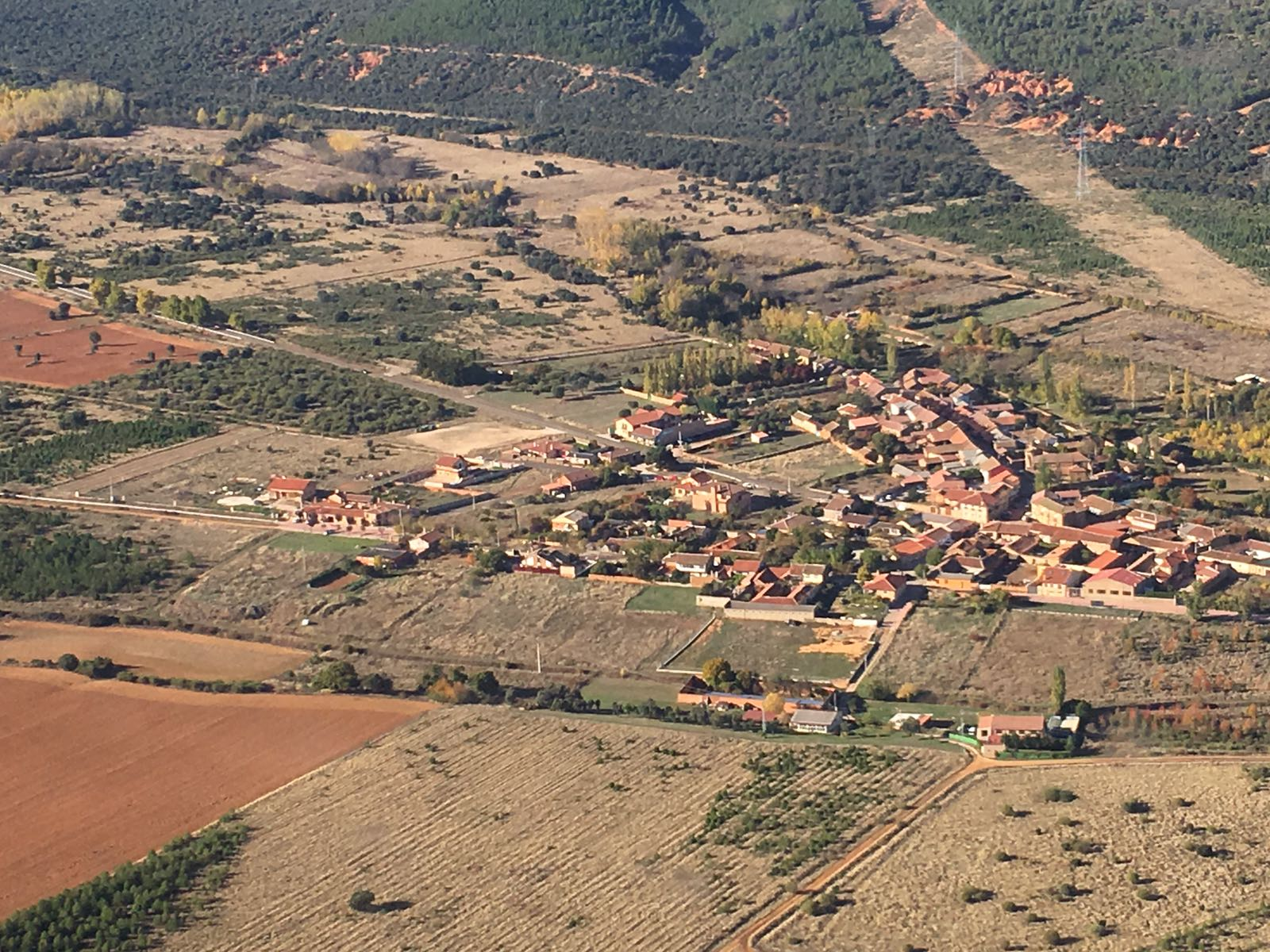 Vista aérea de Murias de Rechivaldo (León, España).